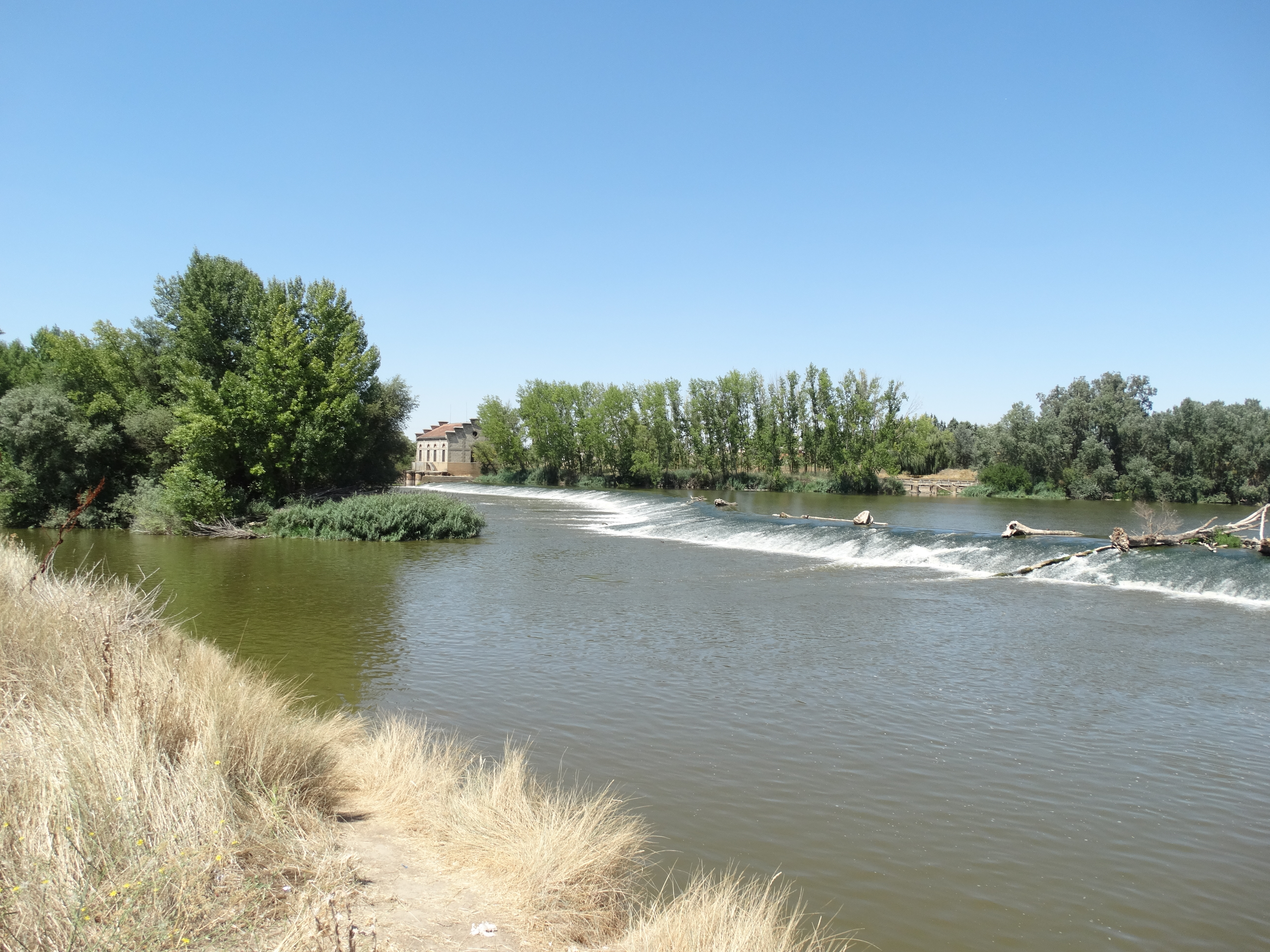 Pesquera en el río Duero que fue propiedad de los monjes de Aniago, actual despoblado en la provincia de Valladolid (España).